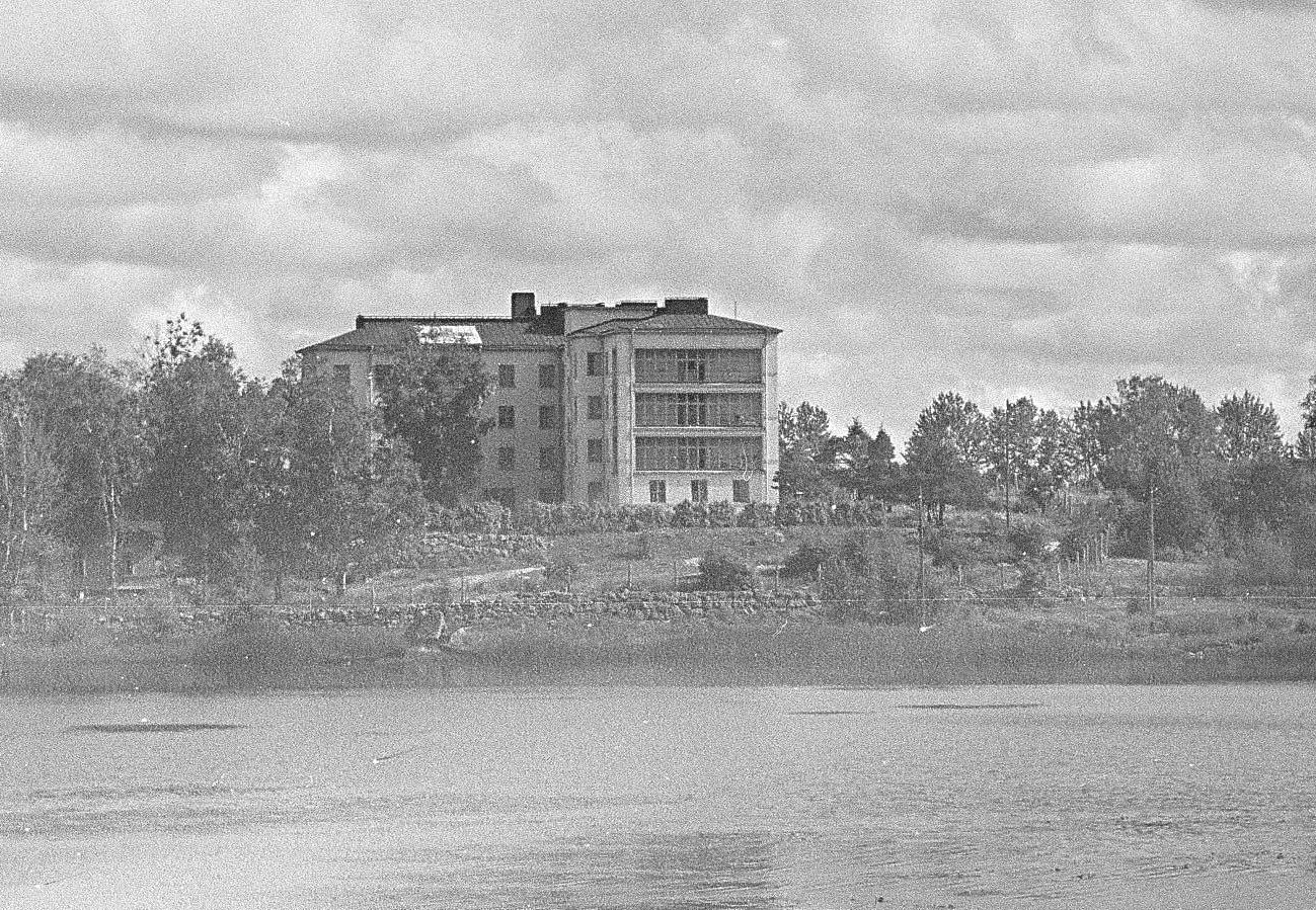 Вид на выборгскую больницу сестёр милосердия с залива. Фото 30.08.1941